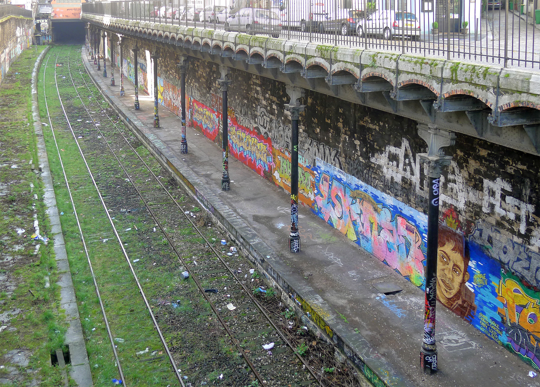 Petite Ceinture (station de l'avenue de Saint-Ouen) - Paris XVIII